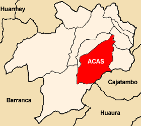 Distrito de Acas